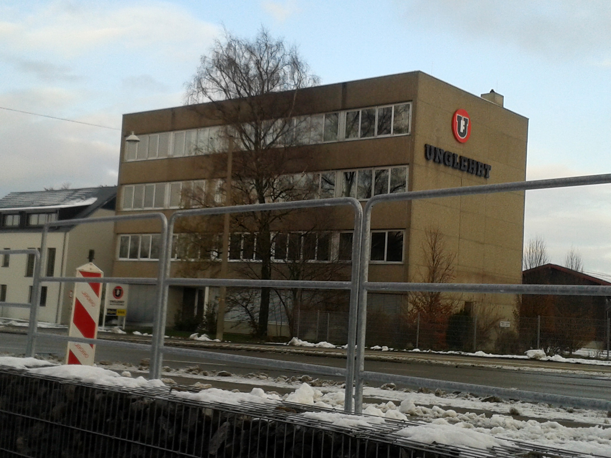 Verwaltungsgebäude der Bauunternehmung Unglehrt GmbH & Co. KG in Memmingen, Allgäuer Straße